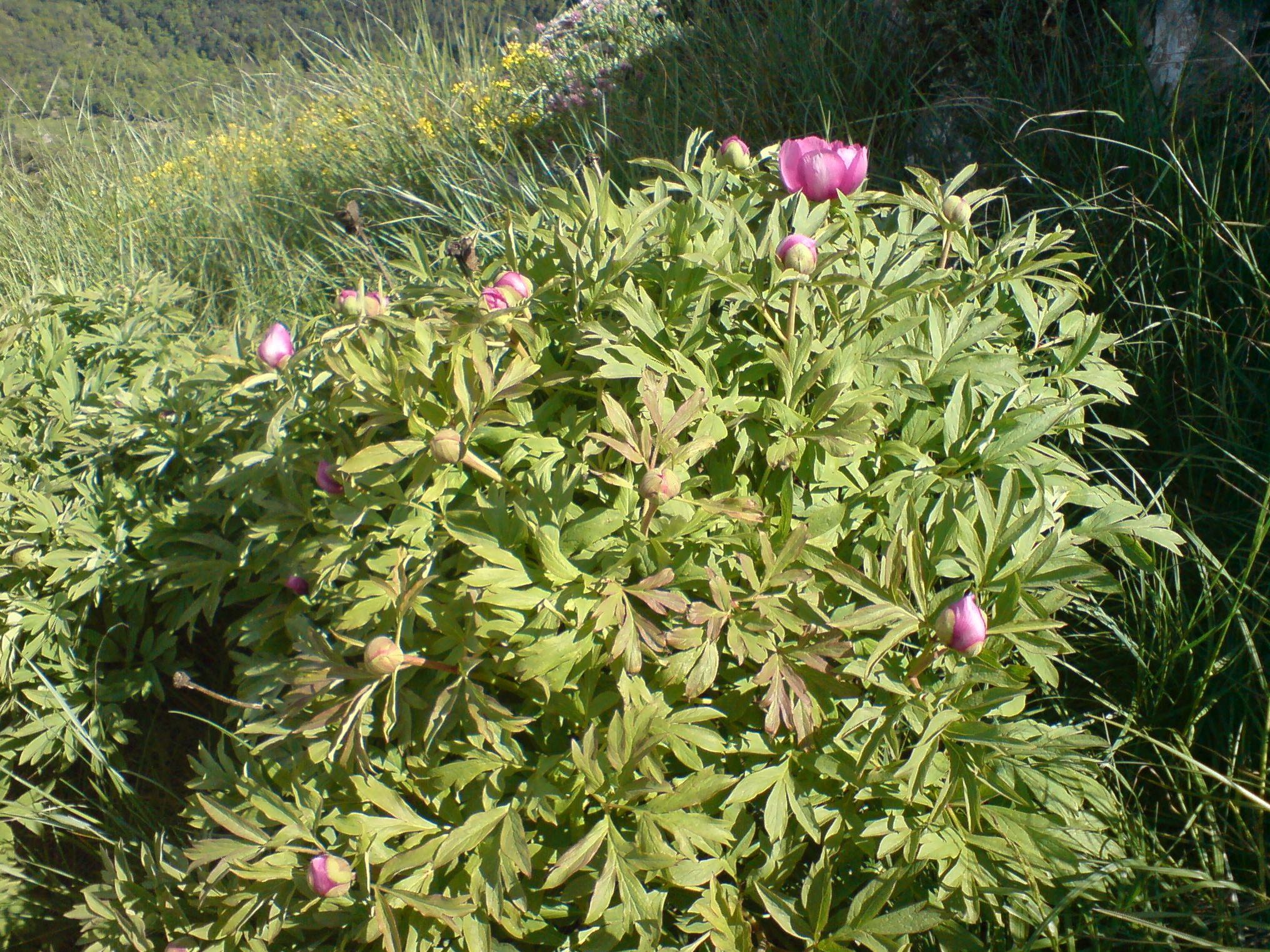 Peònia a l'Alta Garrotxa a uns 1000m